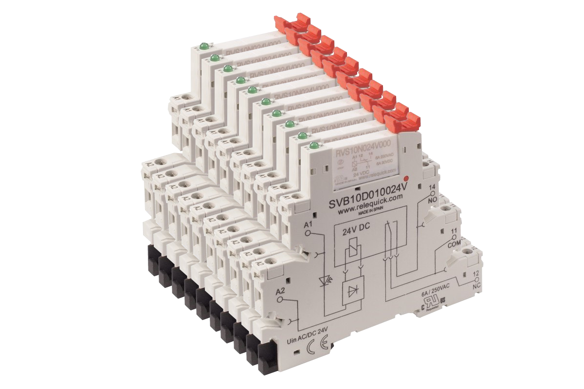 Relequick hermetic relays with connection base only 6 mm wide